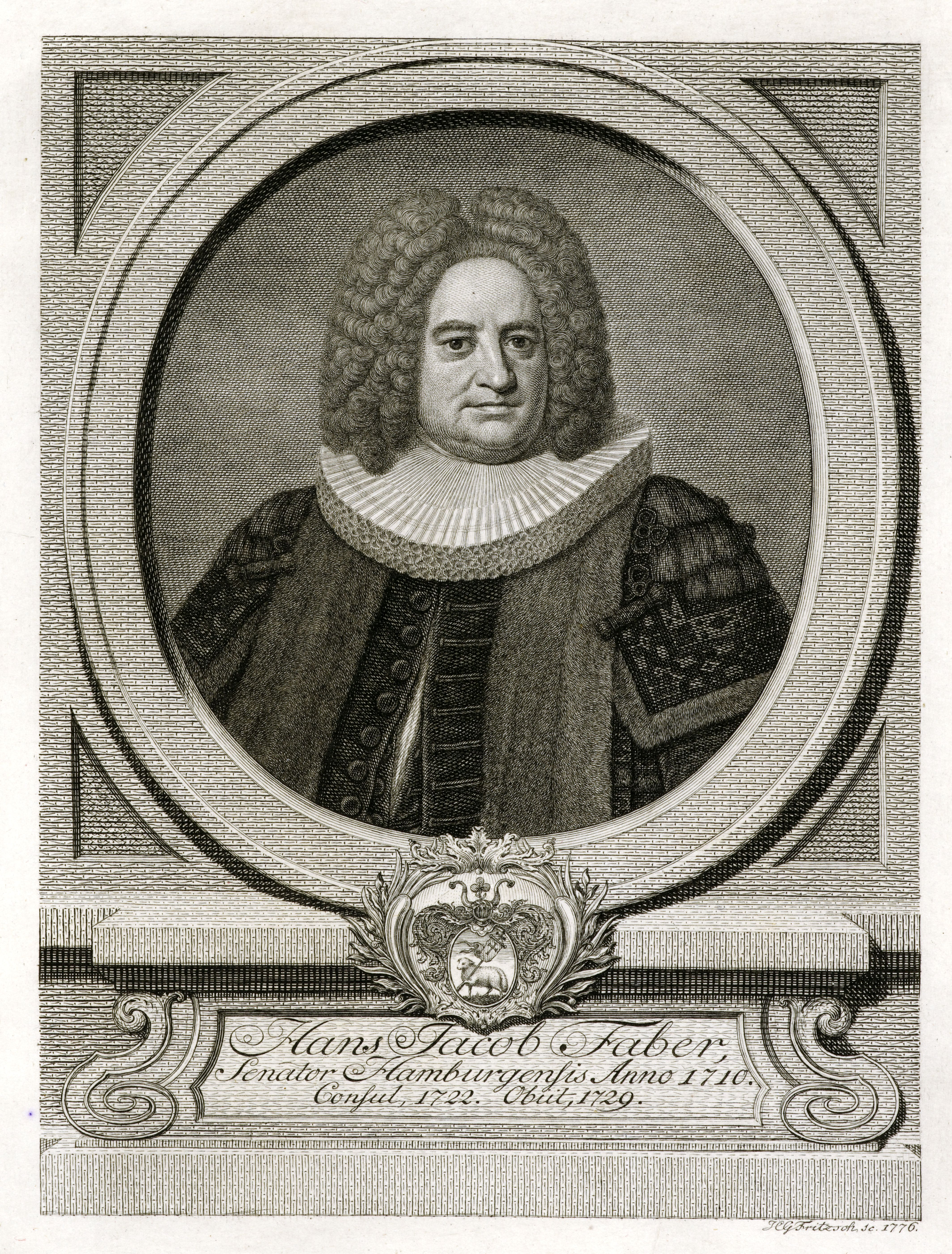 Hans Jacob Faber, Senator Hamburgensis Anno 1710. Consul, 1722. Obut, 1729